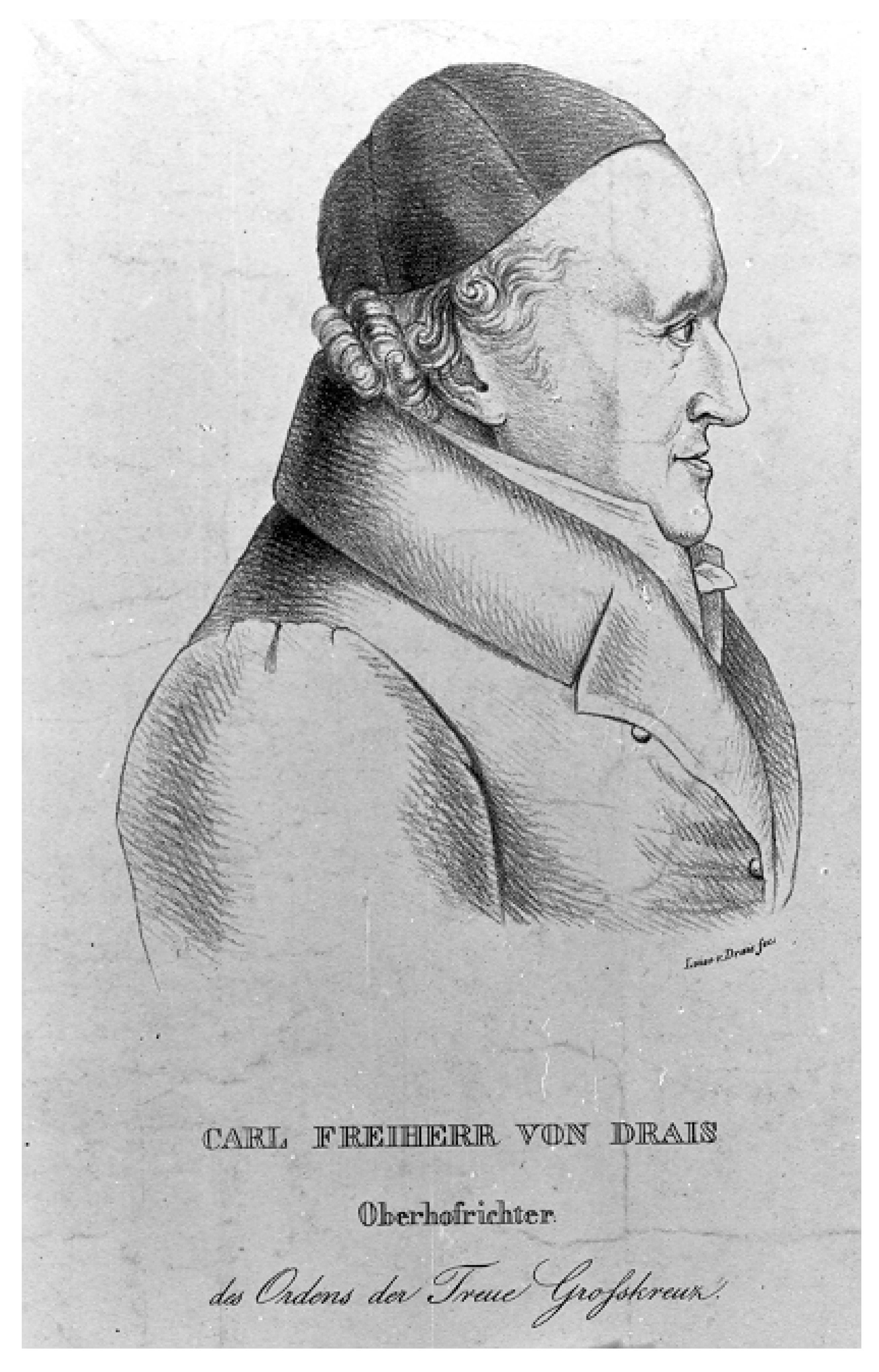 Porträt Karl Wilhelm Ludwig Friedrich Freiherr Drais von Sauerbronns. Lithografie nach einer Bleistiftzeichnung seiner Tochter Louise Drais von Sauerbronn. Generallandesarchiv Karlsruhe: J-Ac-D 153